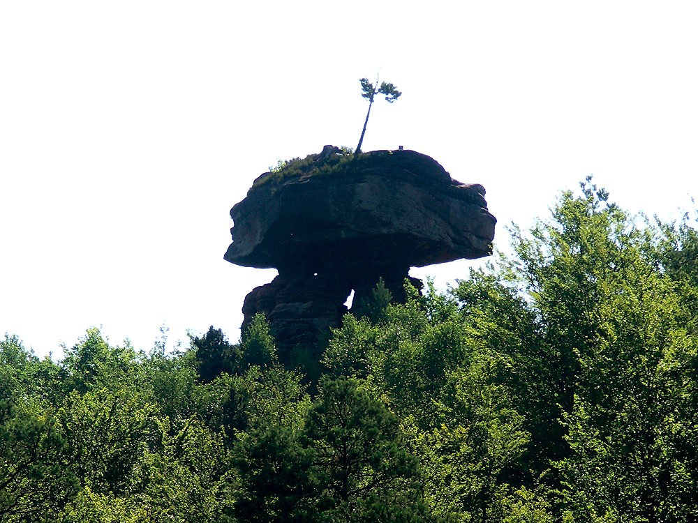 Teufelstisch (Pfalz) bei Hinterweidenthal. Blick von der B 10.